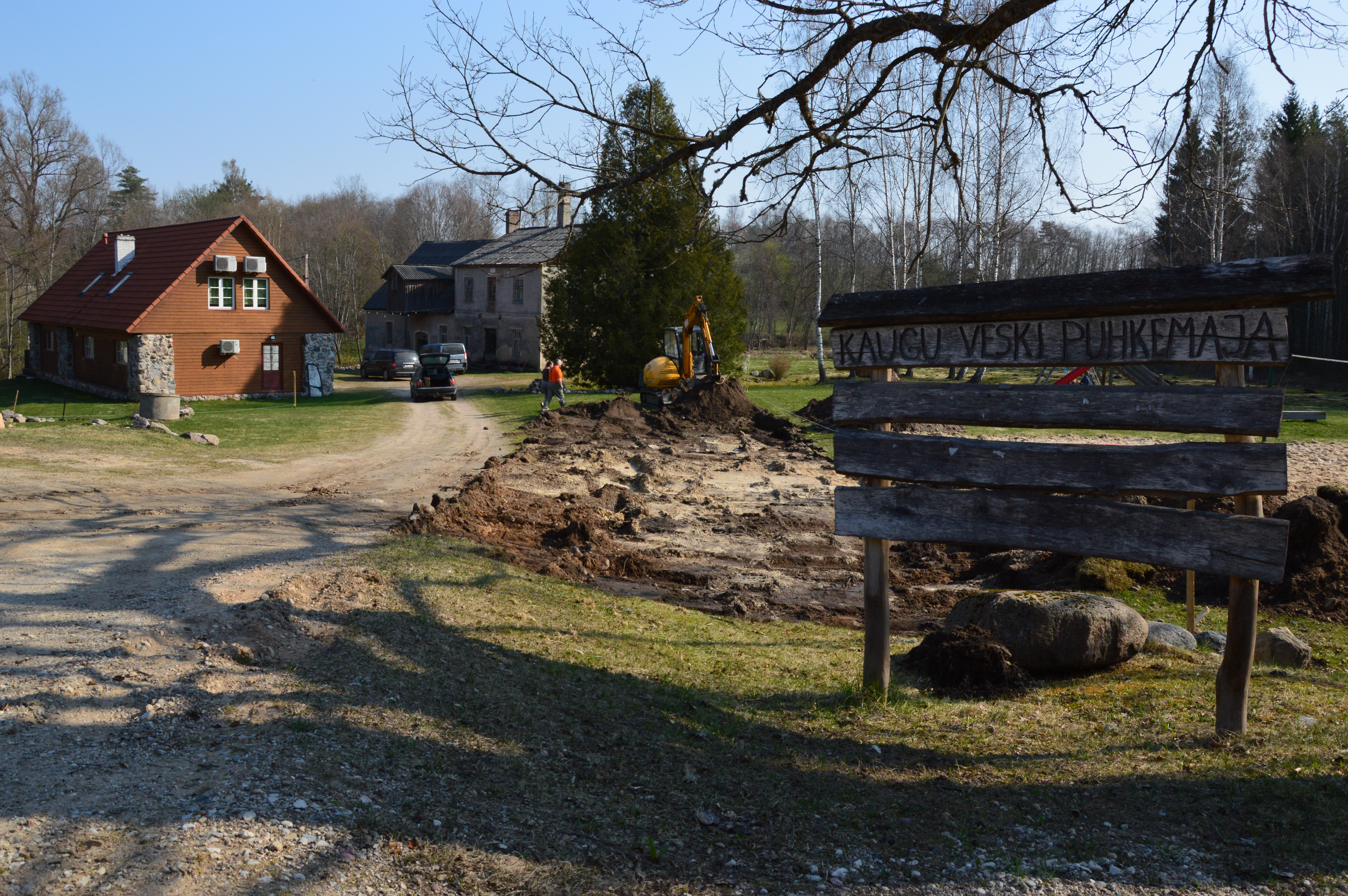 Kaugu veski